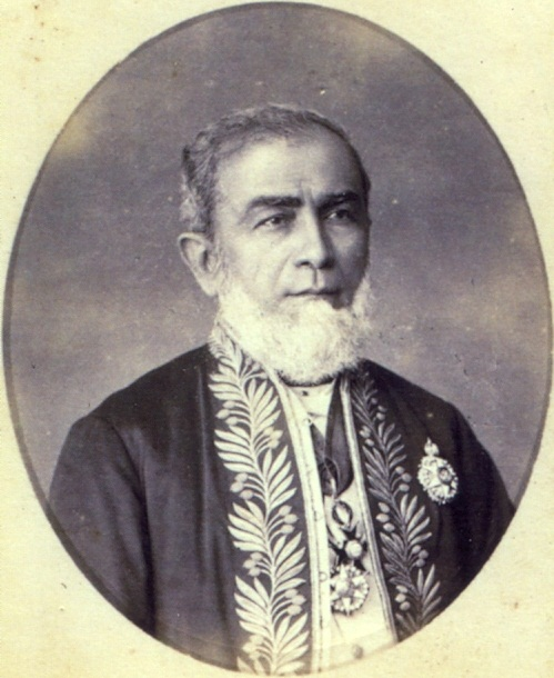 Marquês de Paranaguá, 1885.